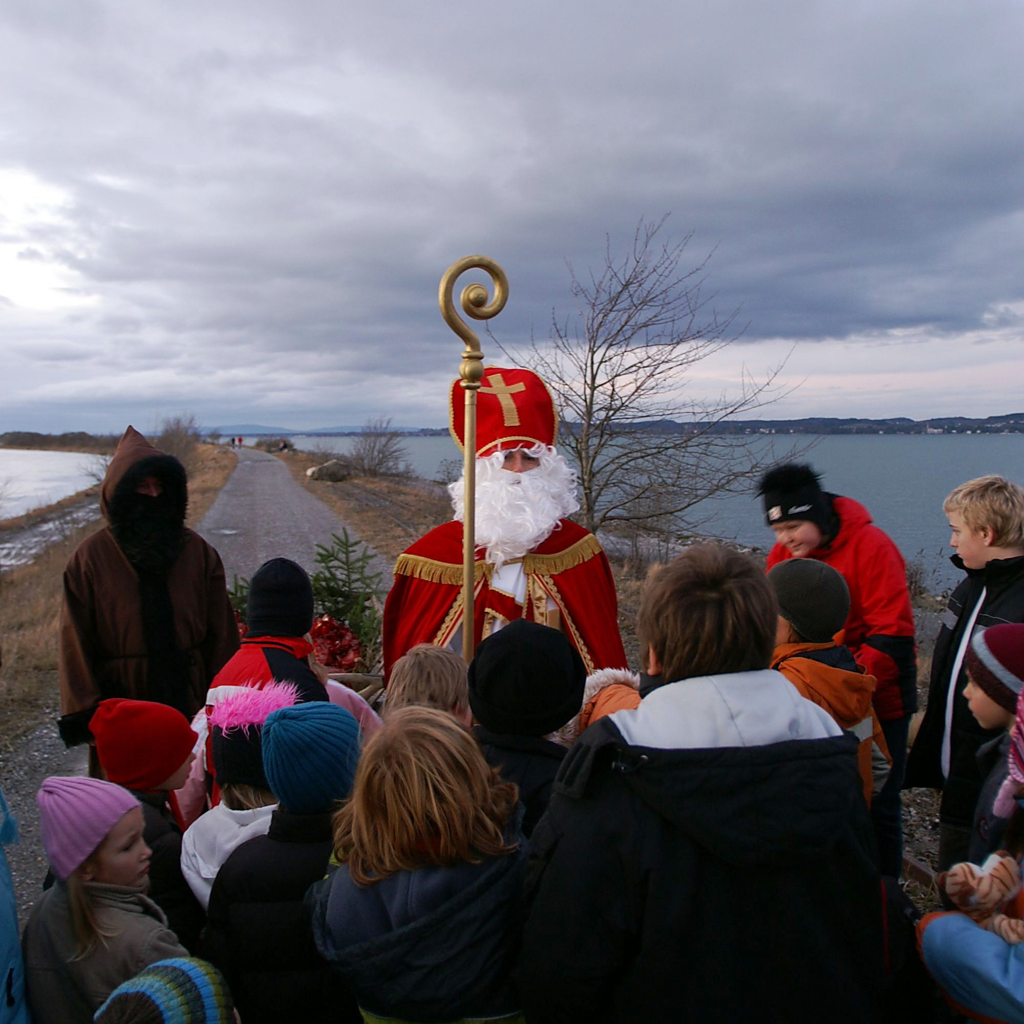 Brauchtum in Vorarlberg; Das Rheinbähnle [1] fährt aus dem weihnachtlich geschmückten Werkhof Lustenau auf dem Rheindamm entlang nach Hard ans Bodenseeufer, wo schon der Samichlaus/Nikolaus auf die Kinder wartet. Er verteilt gemeinsam mit seinem Knecht Ruprecht Gaben an die Kinder, dann ziehen die beiden mit dem Handwagen weiter.